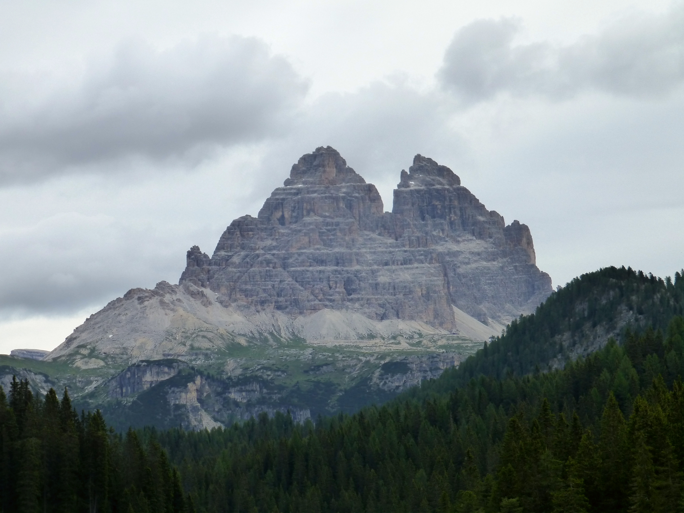 2,999m Tre Cime di Lavaredo Lago di Misurina Italy